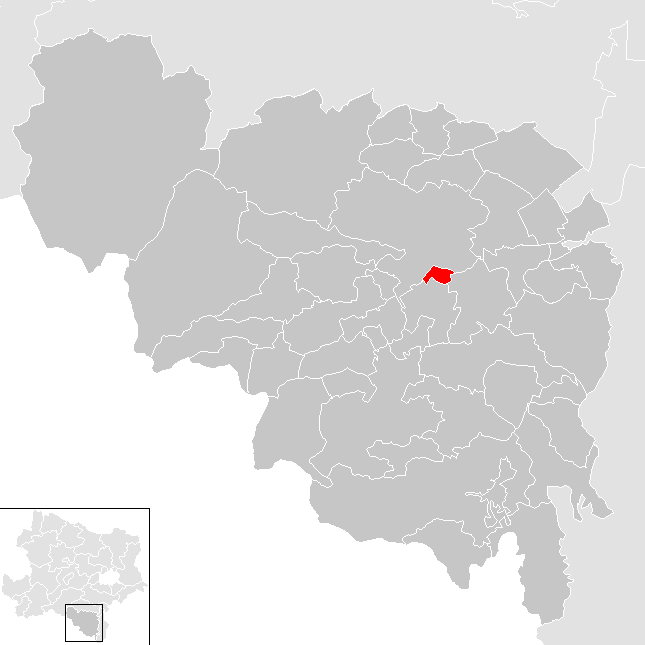 Bezirk Neunkirchen